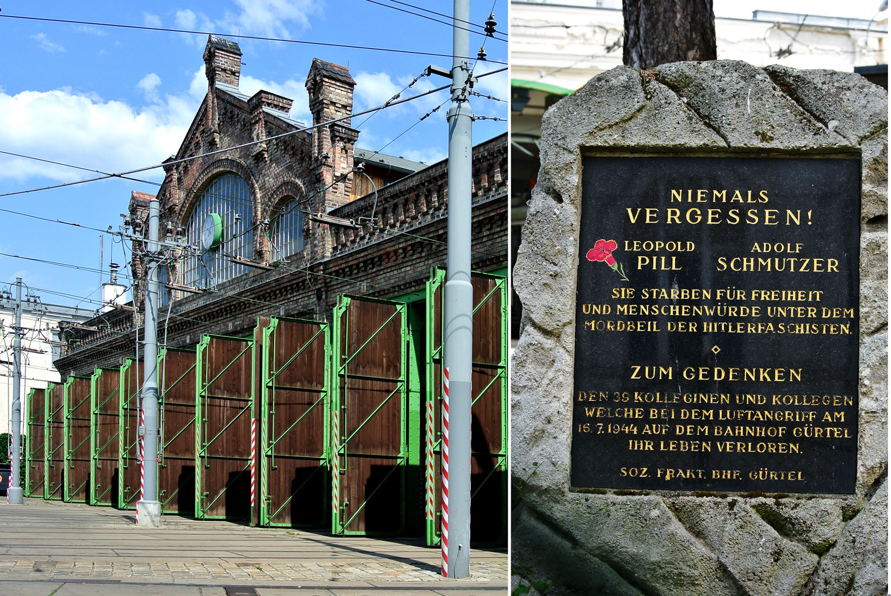 NIEMALS VERGESSEN! Leopold Pill, Adolf Schmutzer Sie starben für Freiheit und Menschenwürde unter dem Mordbeil der Hitlerfaschisten. ZUM GEDENKEN Den 39 Kolleginnen und Kollegen, welche bei dem Luftangriff am 16.7.1944 auf dem Bahnhof Gürtel ihr Leben verloren. Soz. Frakt. BHF: GÜRTEL Leopold Pill (1896–1943) Adolf Schmutzer (1895–1943) Straßenbahnremise Währing, 18.,Währinger Gürtel 131/ Marsanogasse